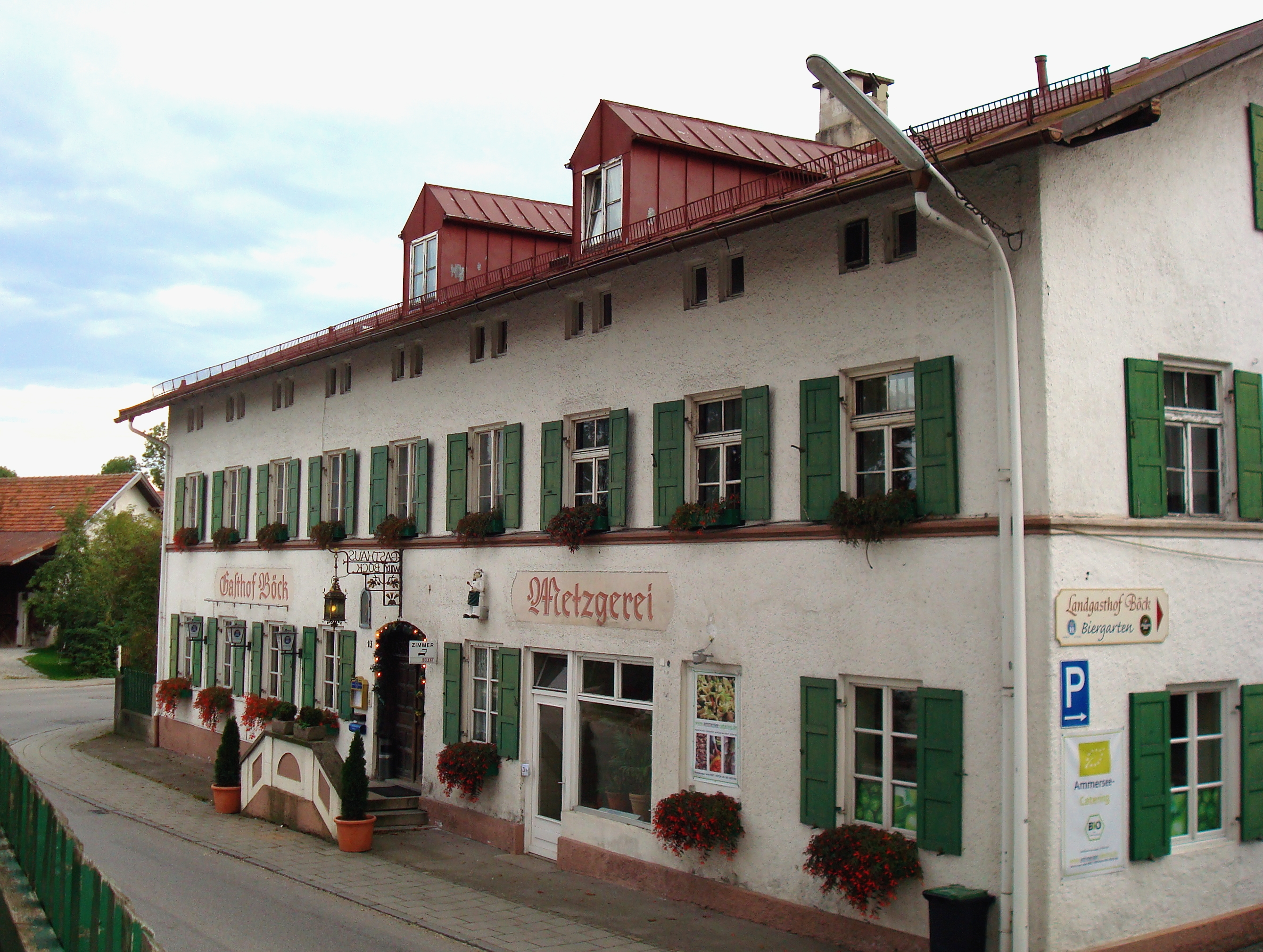 Gauting, Ortsteil Unterbrunn, Hauptstraße 13. Gasthof Böck, langgestreckter, zweigeschossiger Satteldachbau mit Kniestock, bez. 1865. This is a photograph of an architectural monument.